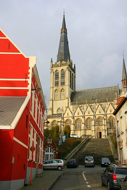 Alsemberg